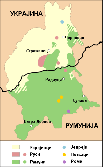 Етничка мапа данашње области Буковина Аутор преведене мапе: Јован Вуковић Превод слике са оставе Image:Bucovethn.png која је у Јавном власништву